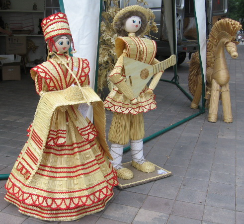 Декоративные изделия соломоплетения